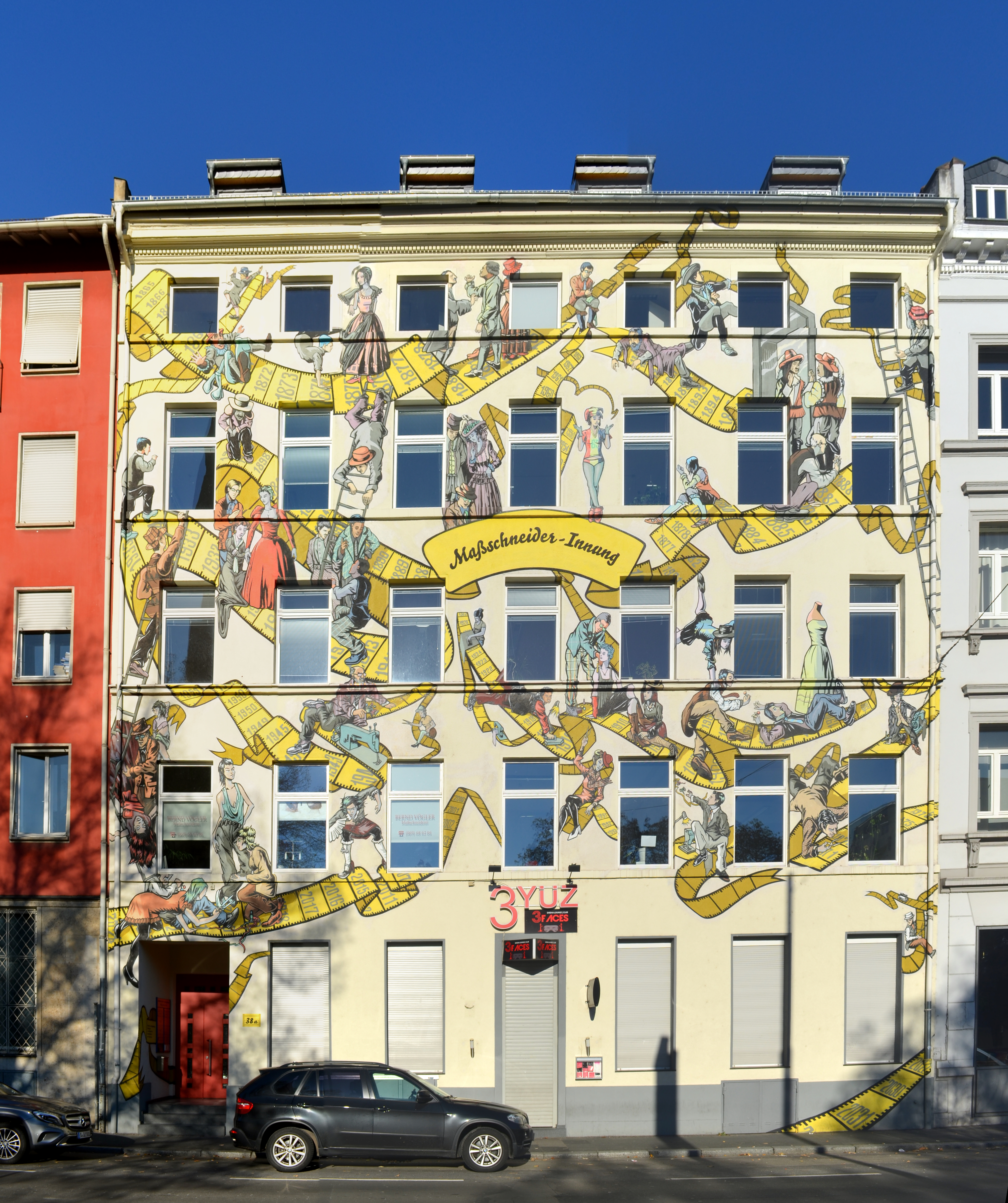 Frankfurt, Bleichstraße 38a